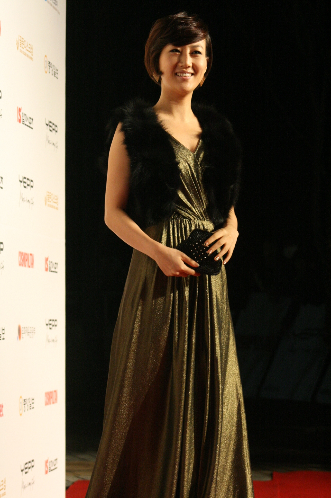 대한민국의 가수 장윤정